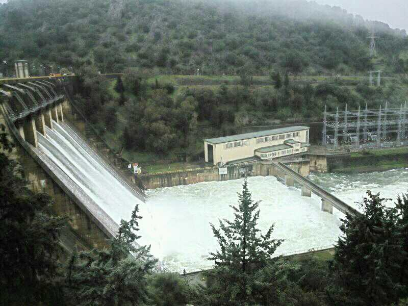 Presa de Cijara 2013